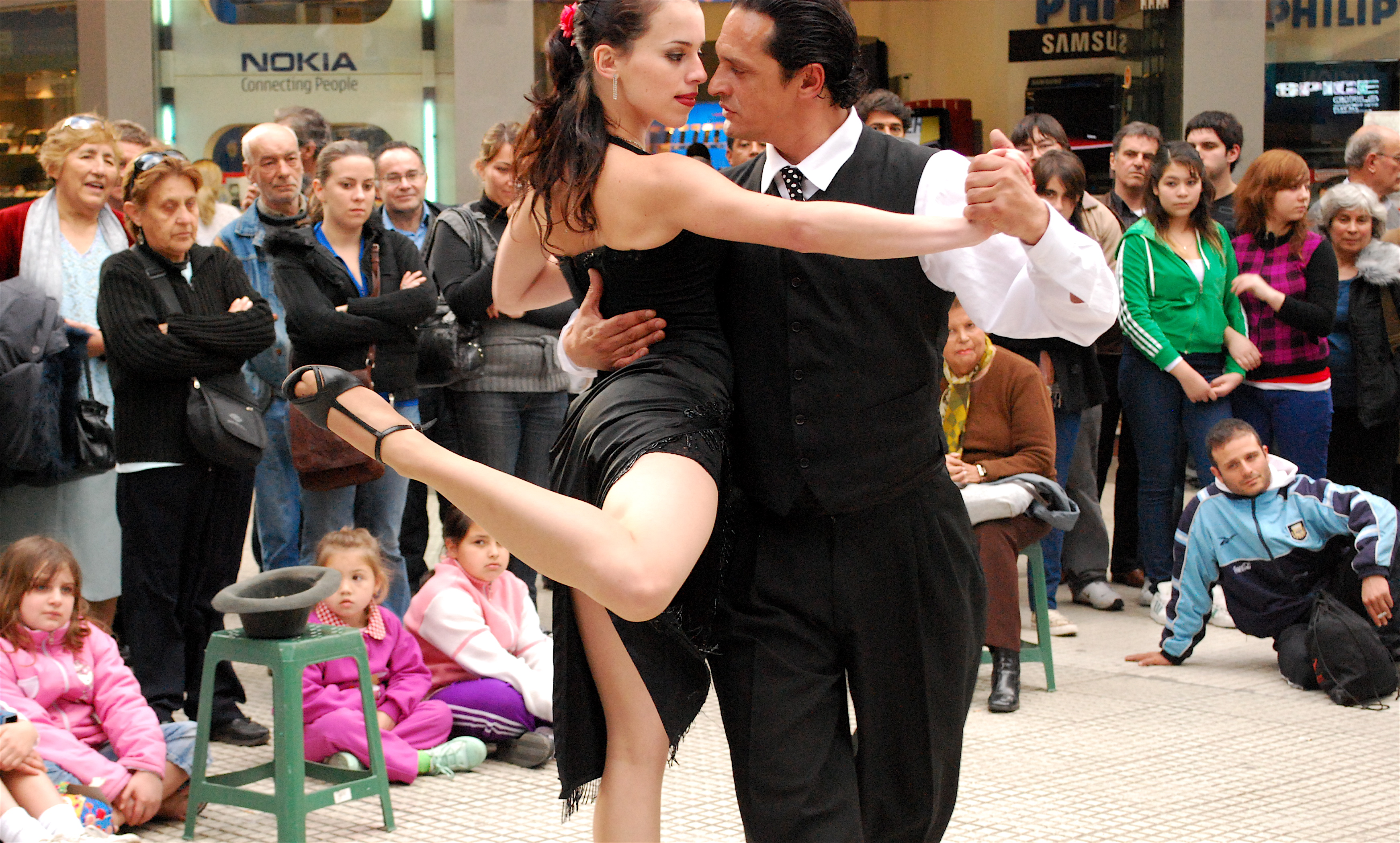 Street tango